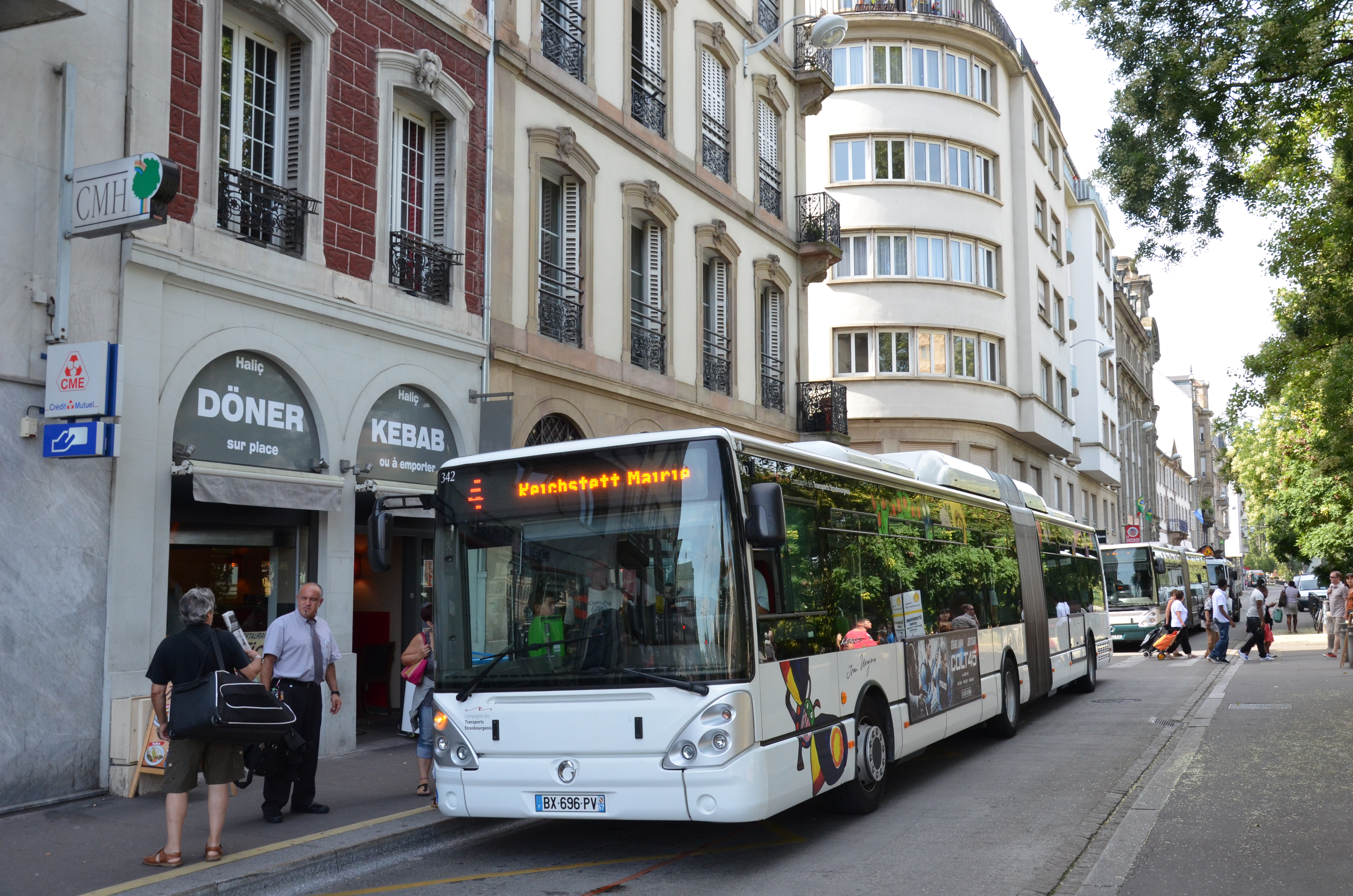 Irisbus Citelis 18 n°342 sur la ligne 4 du réseau CTS de Strasbourg, à l'arrêt Les Halles Pont de Paris.